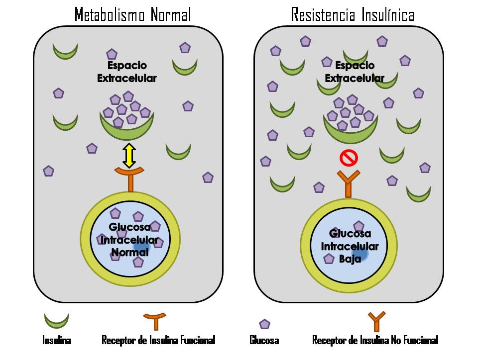 Comparación entre un metabolismo normal de la insulina y la resistencia a la insulina.